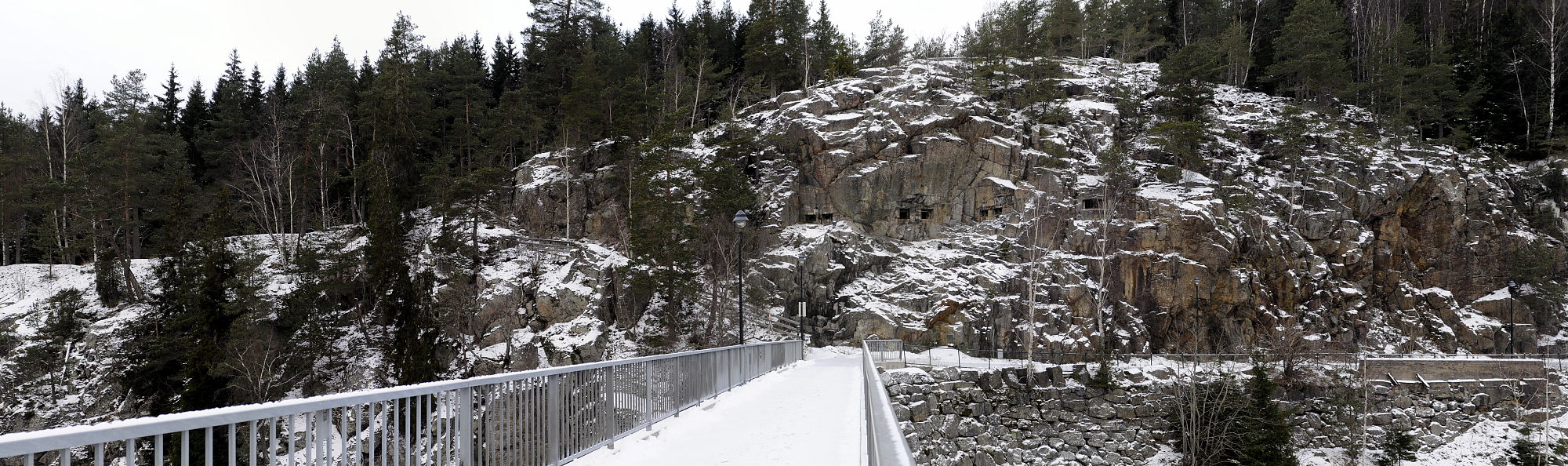 Fossum brogalleri in Østfold, Norway